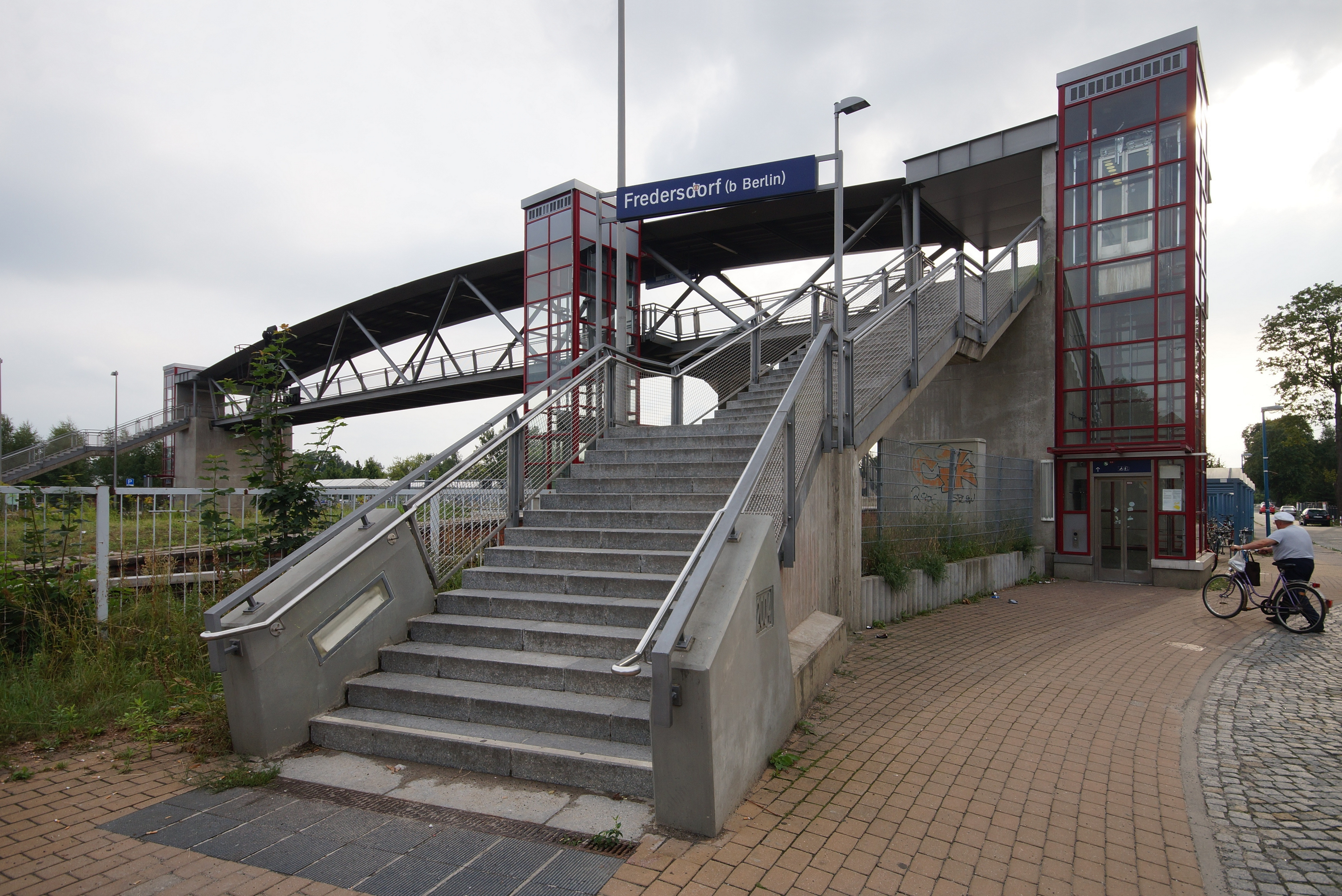 Nordeingang des Bahnhofs Fredersdorf (b Berlin) von Fredersdorf-Vogelsdorf auf der Preußischen Ostbahn